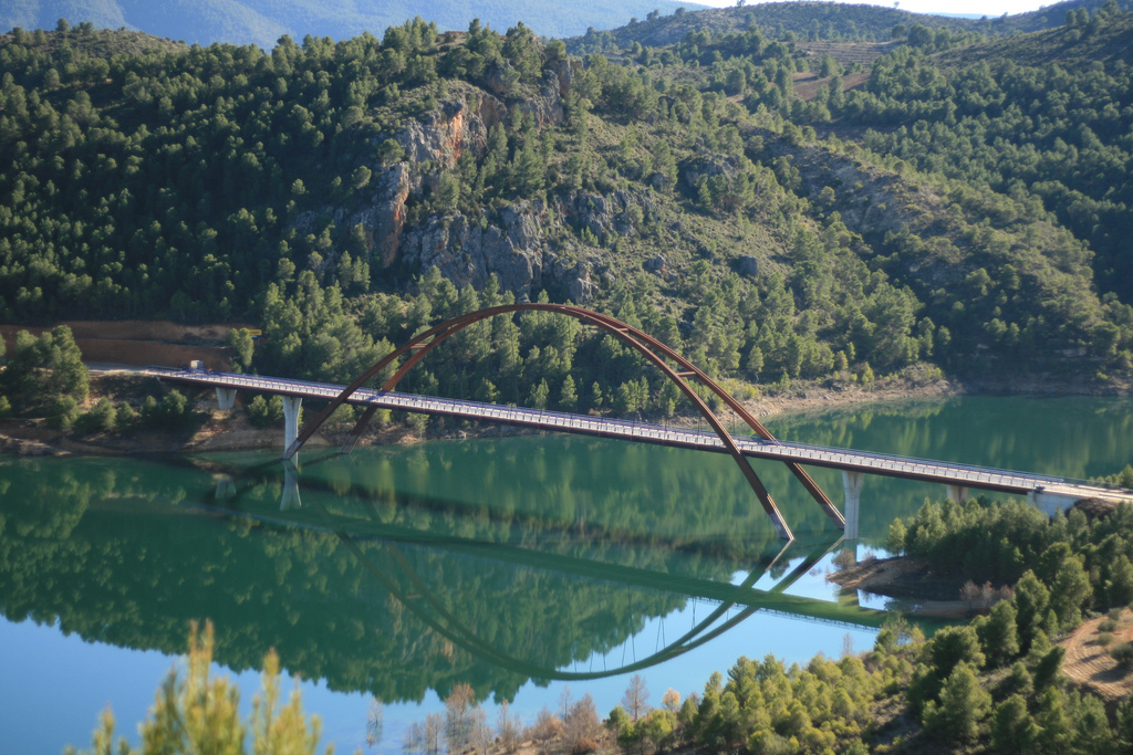 Puente de la Vicaría